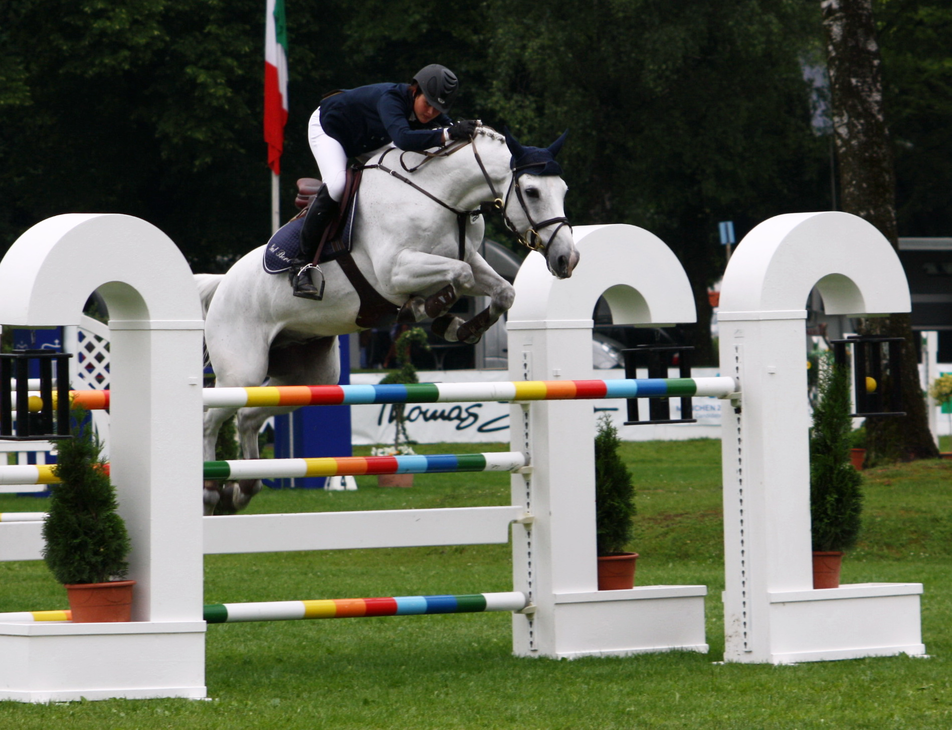 Springreiterin Katrin Eckermann auf dem Pferd Carlson auf der Veranstaltung Pferd International 2011